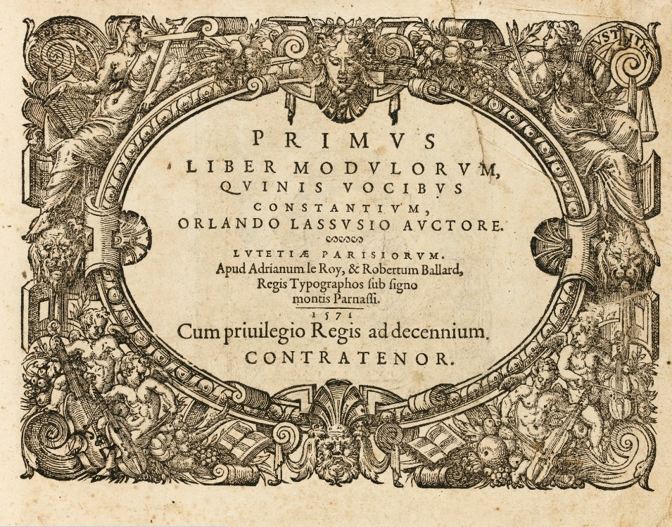 Title page of Lasso's Motettti quinque vocum (Paris, 1571)